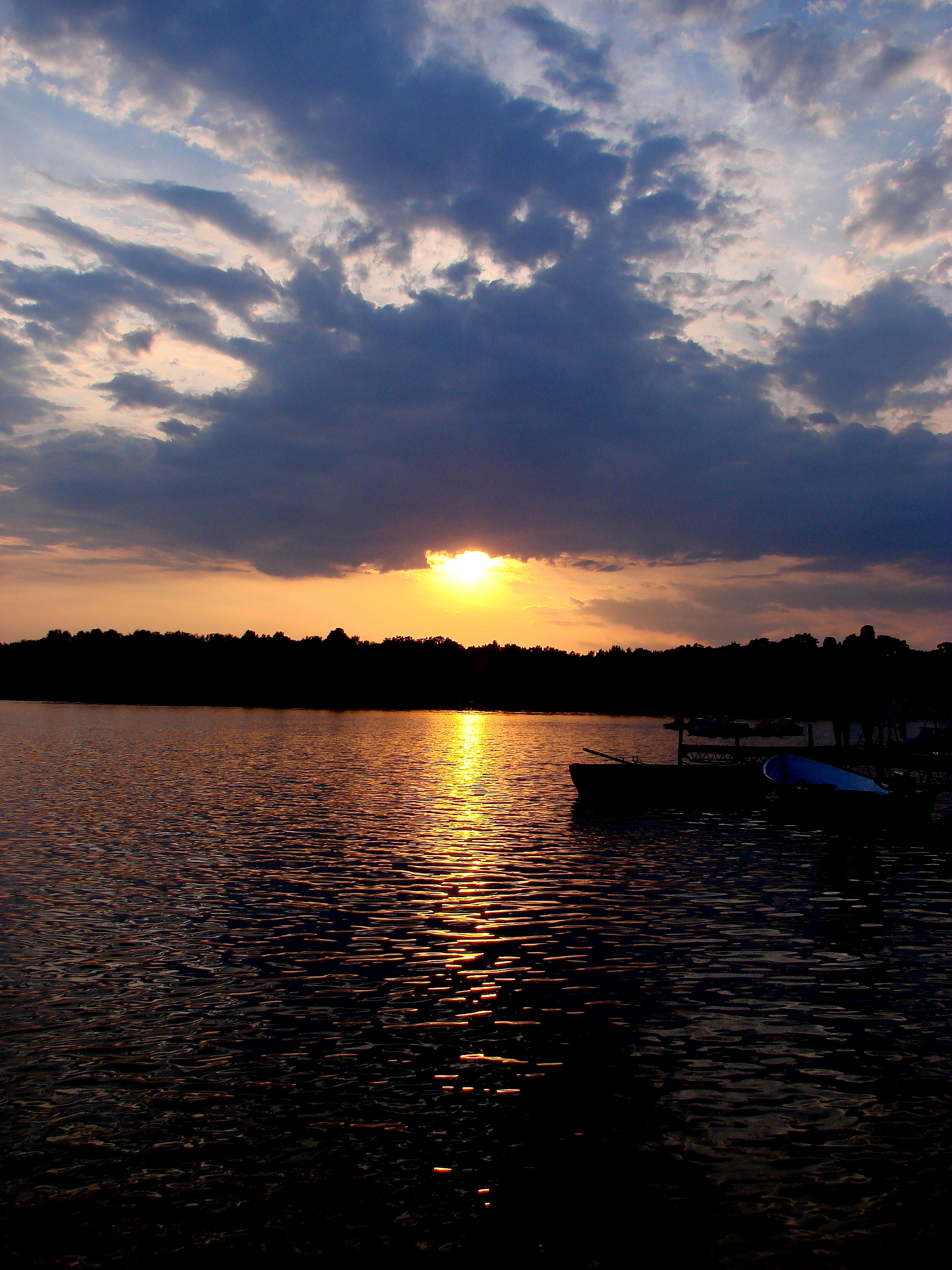 Zachód słońca nad jeziorem Paprocany w Tychach.